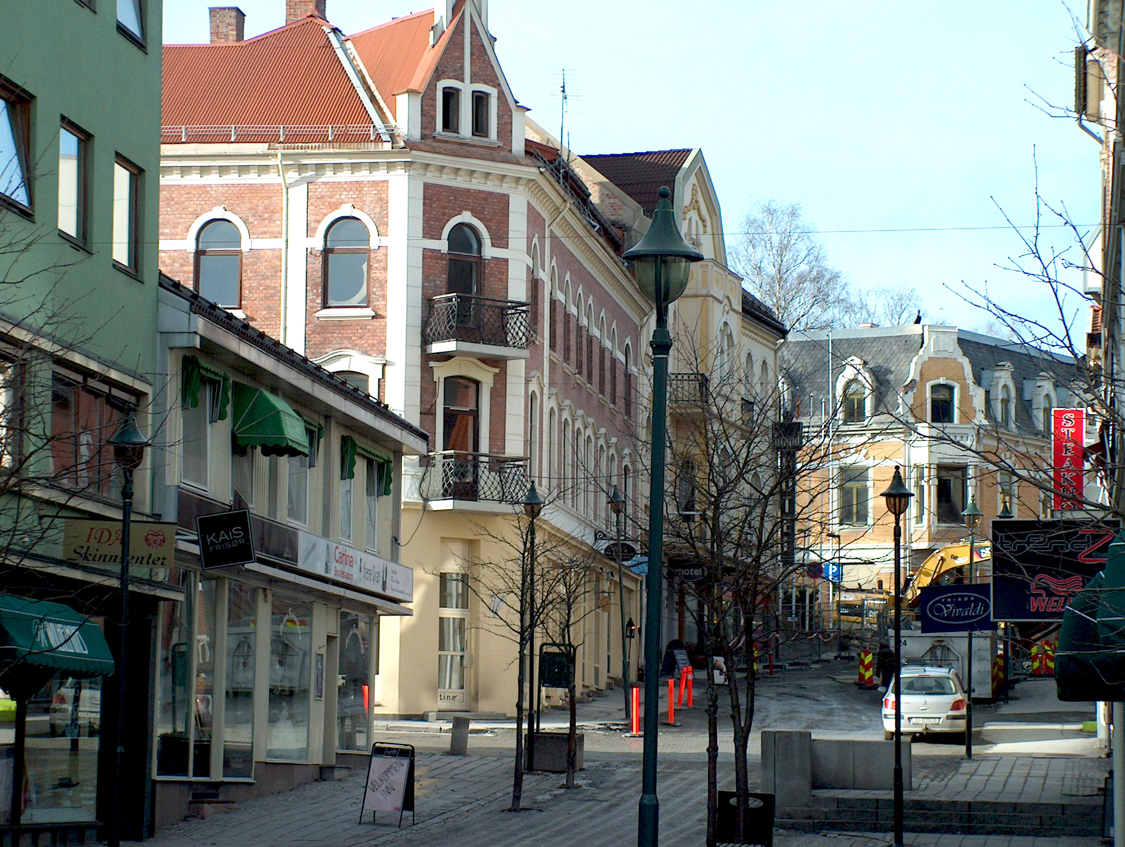 Stabells gate i Hønefoss